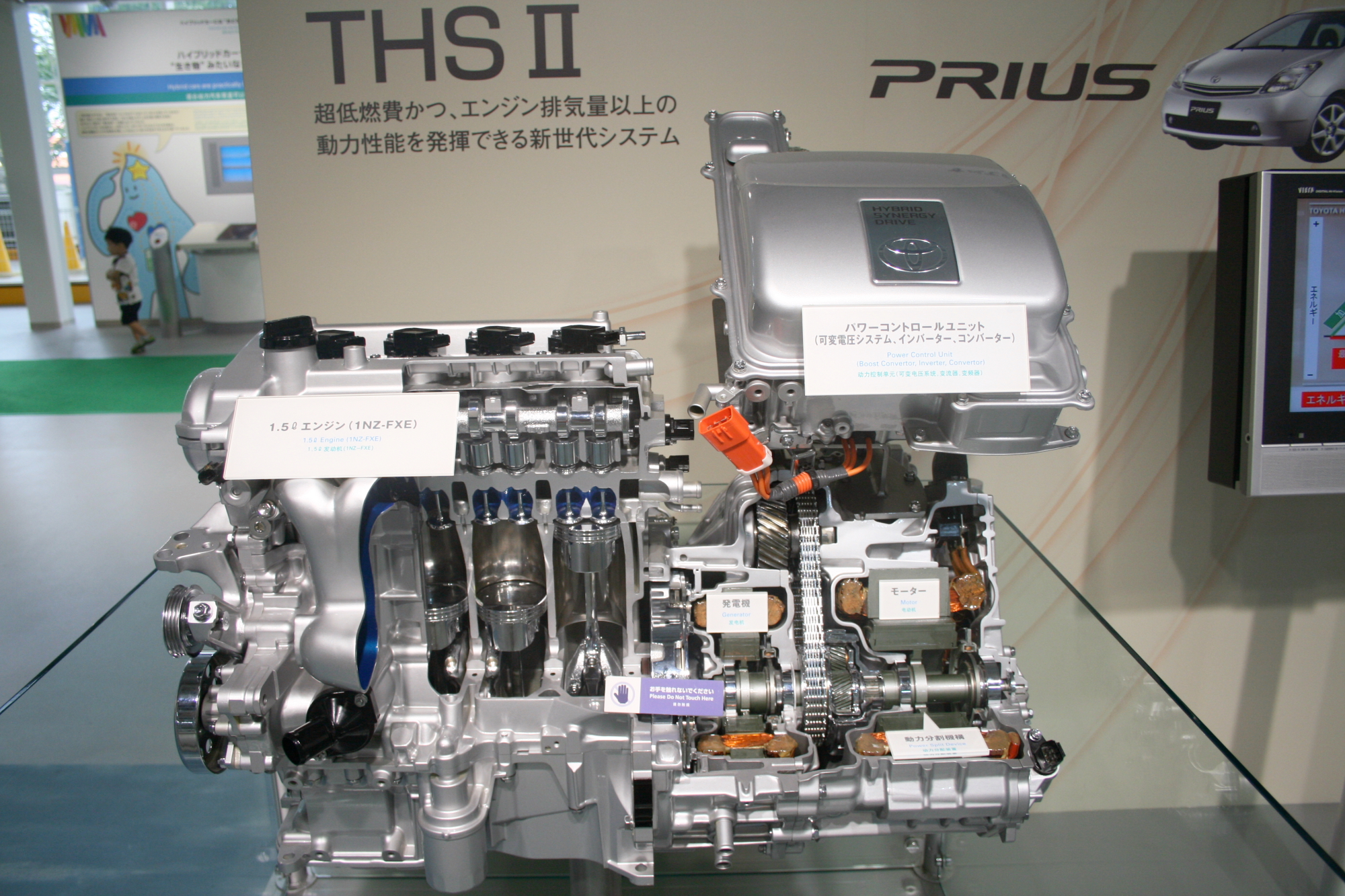 Toyota THS2